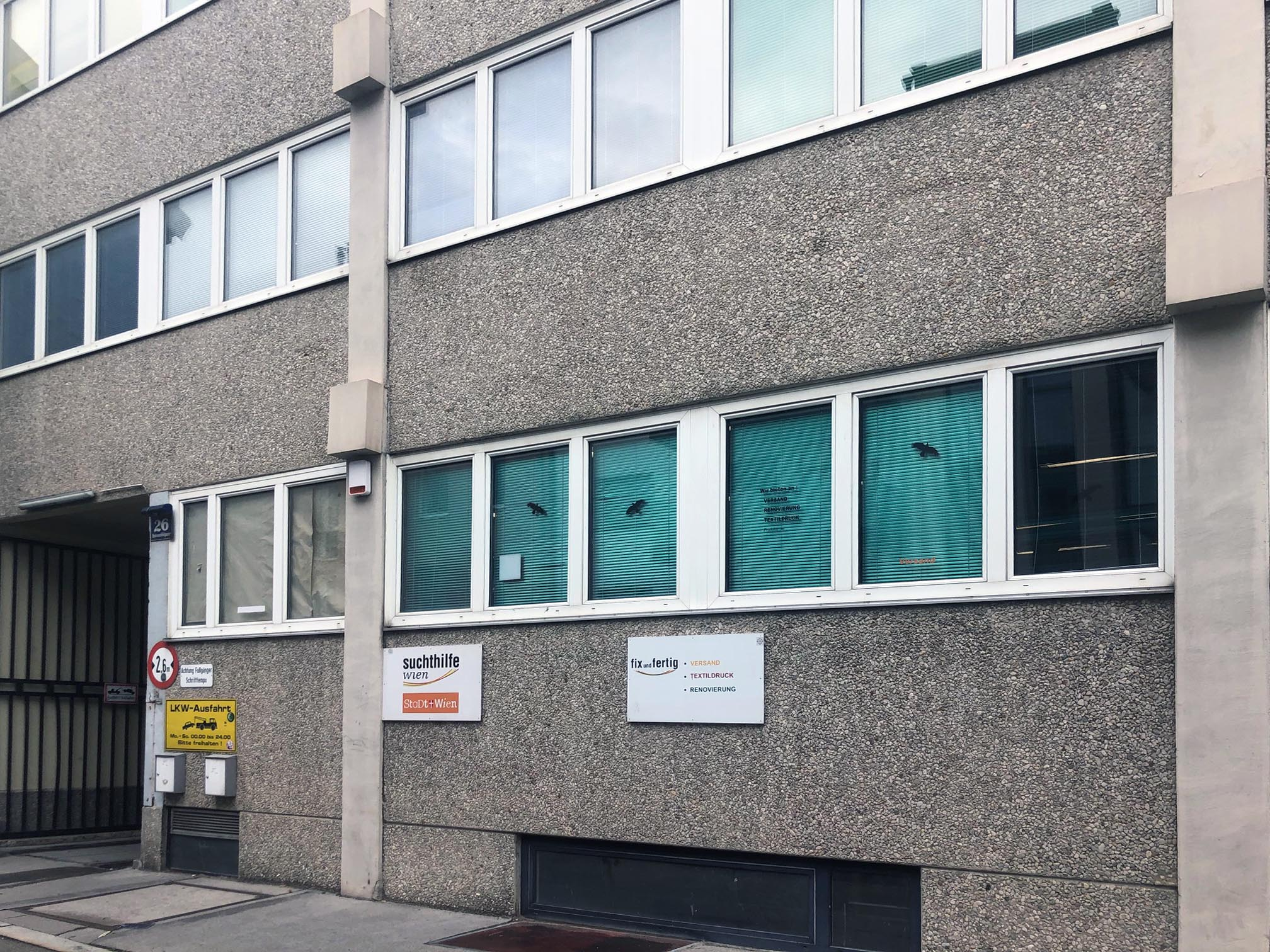 fix und fertig